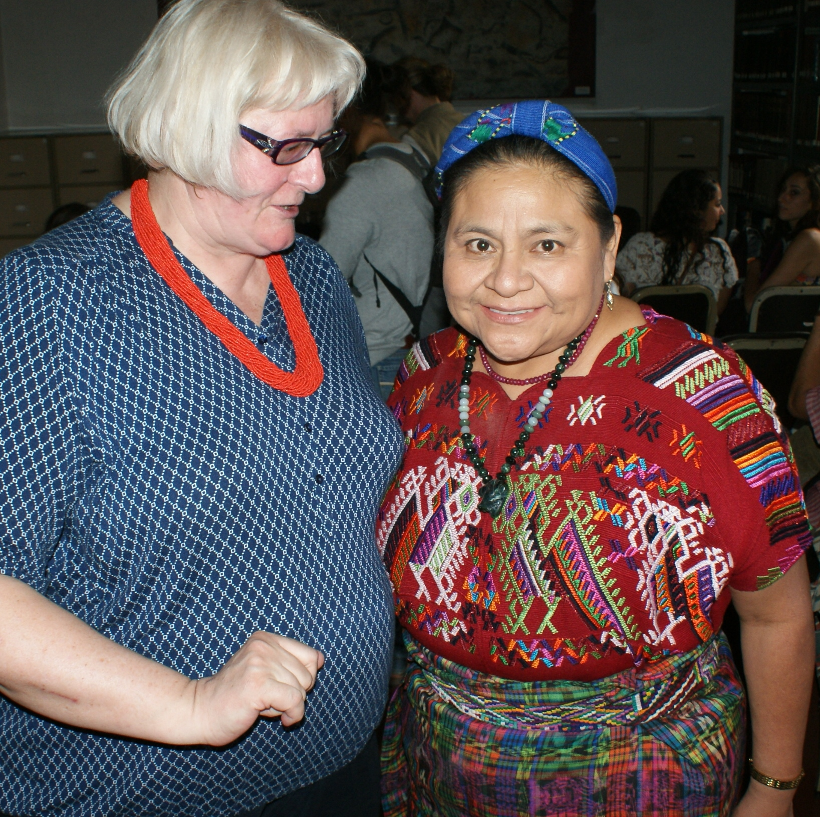 FOT.1. Prof. Magdalena Śniadecka-Kotarska z laureatką pokojowej nagrody Nobla Rigobertą Menchú Tum [Guatemala 2013, fot. J. Kotarski]